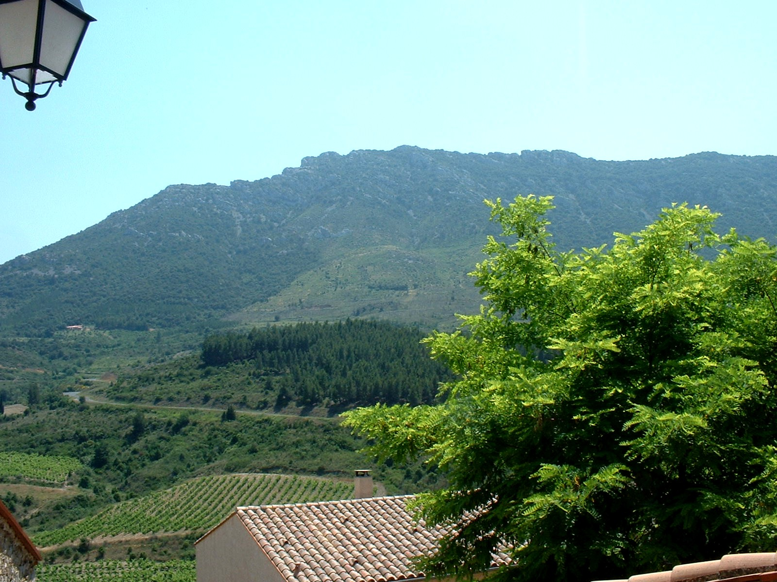 Cucugnan, vignes et Mont Tauch